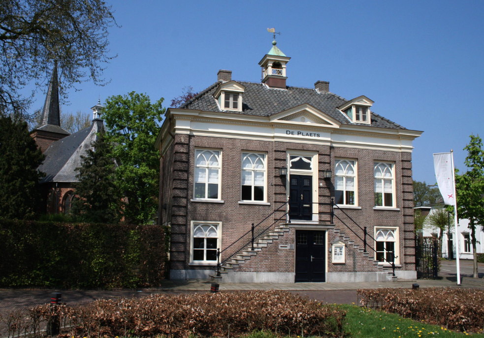 De Plaets. Voormalig Raadhuis. Nu doet het pand dienst als kantoor (Experientis B.V.) en trouwlocatie.